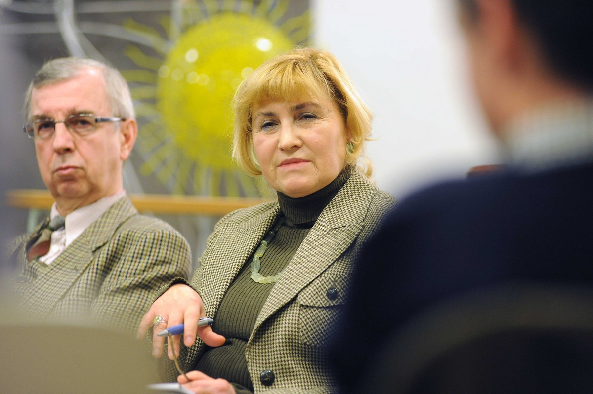 Flensburgs Stadtpräsidentin Swetlana Krätzschmar bei einer Diskussion in der Flensburger Phänomenta 2013